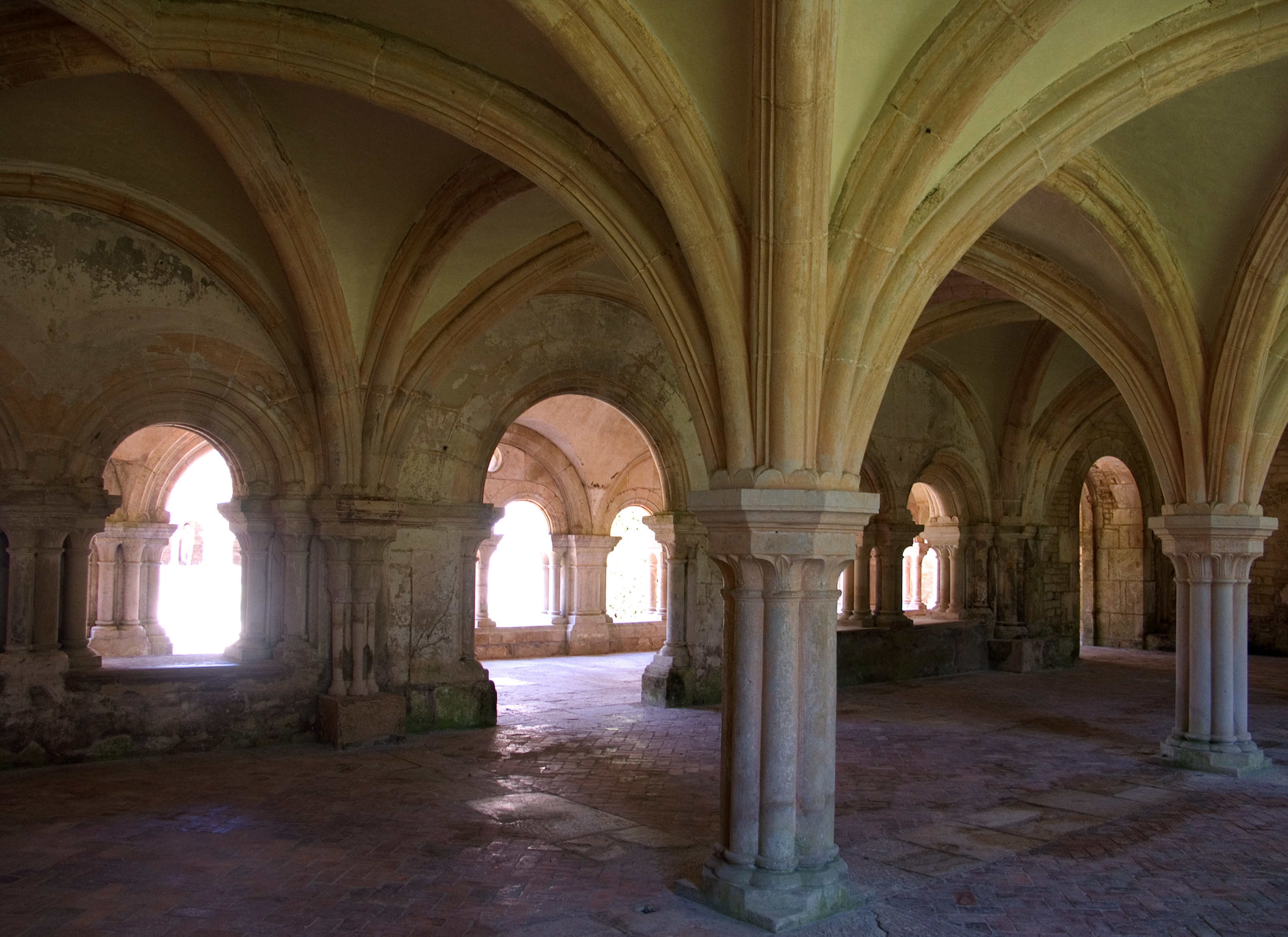 Abbaye de Fontenay (Salle capitulaire)